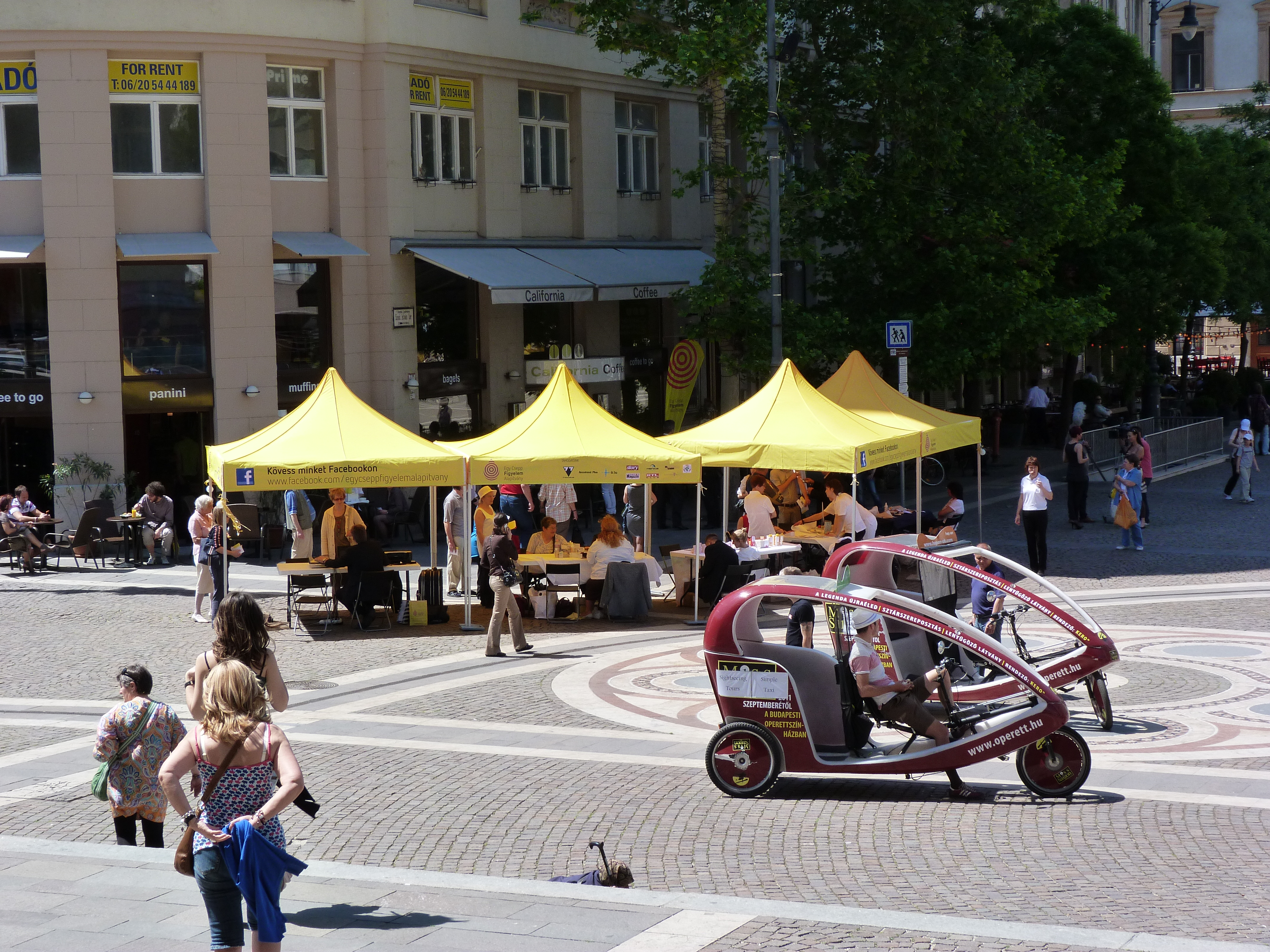 Facebook-esemény a Bazilika előtt. Az Egy Csepp Tesztet (ECSET) az Egy Csepp Figyelem Alapítvány hozta létre. Az Alapítvány célja az egészséges életvitel népszerűsítése. Minden megyeszékhelyen ingyenes szűrésekkel kívánják segíteni a polgárokat abban, hogy egészségi állapotukat ellenőriztetni tudják és még időben változtatni tudjanak életmódjukon. Az Alapítvány szakemberei orvoshoz irányítják azokat, akiknek rossz a mérési eredménye